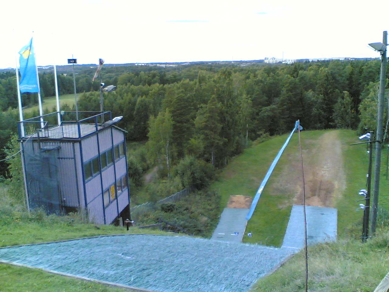 Herttoniemen Hyppyrimäki